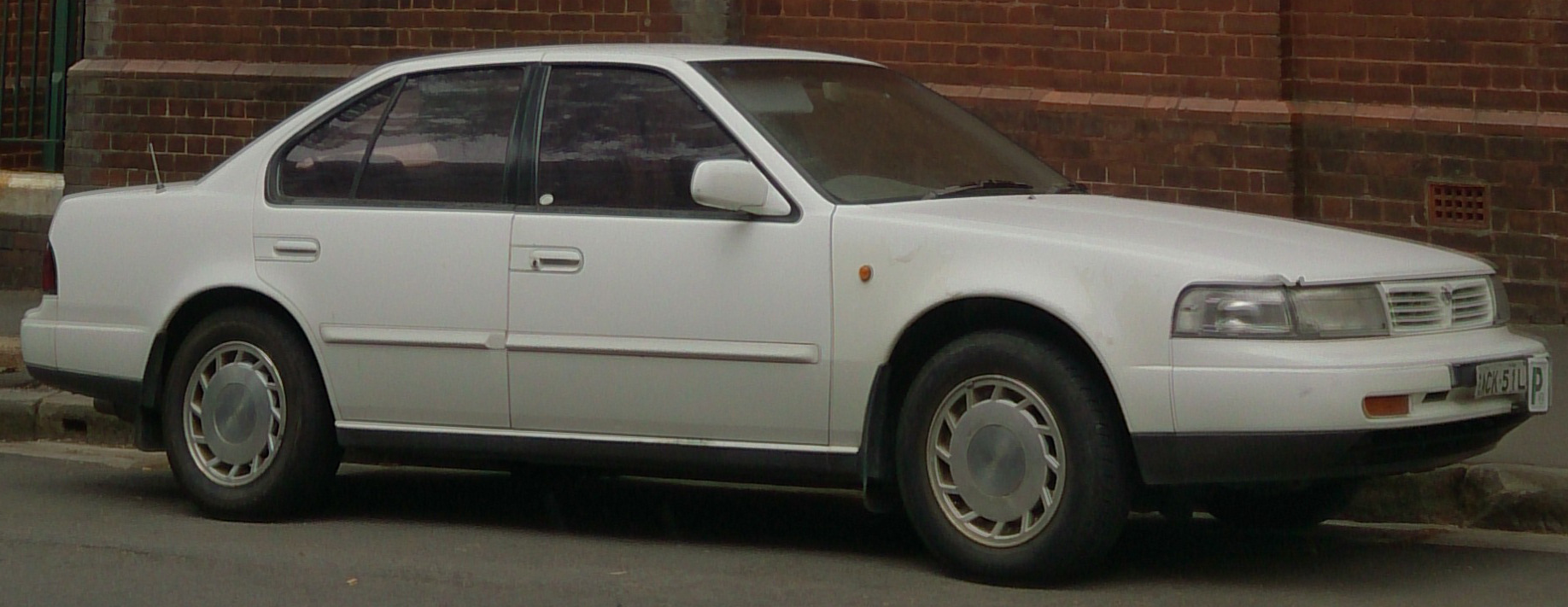 Nissan Maxima